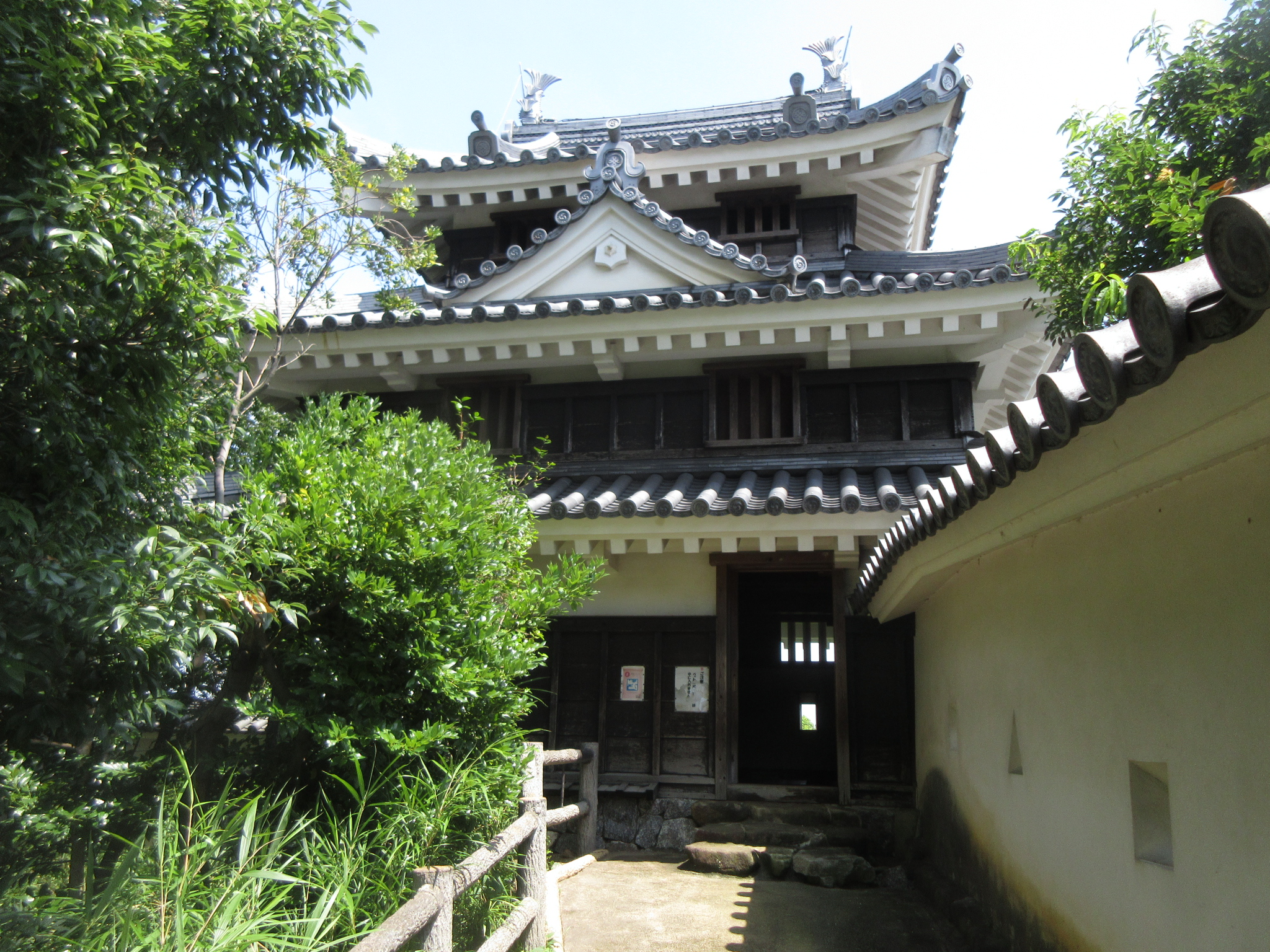 1996年に復元された西尾城本丸丑寅櫓